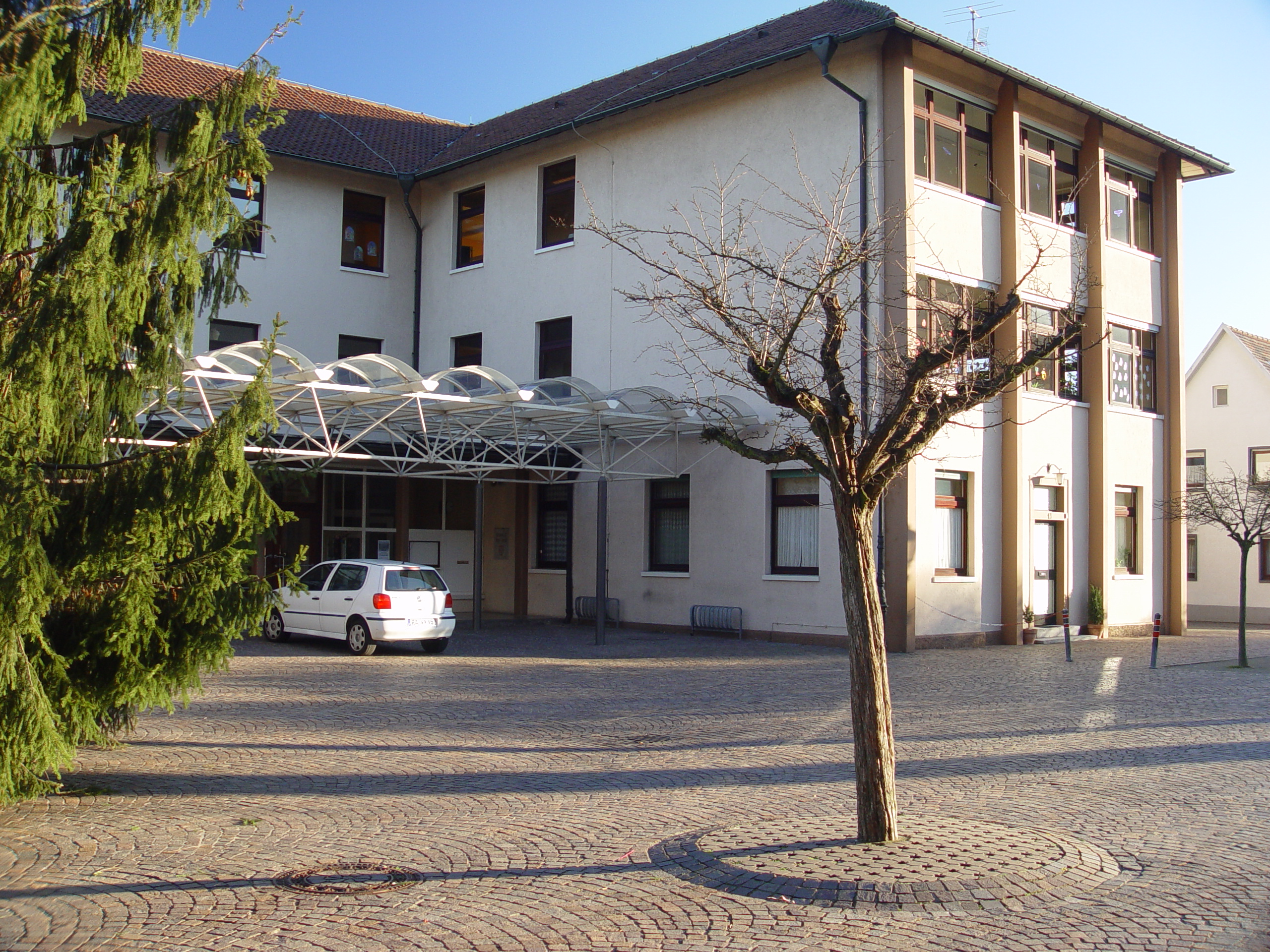 Die Grundschule im badischen Bietigheim liegt direkt neben der katholischen Kirche.